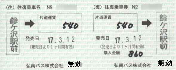 弘南バス往復乗車券(鰺ヶ沢駅前案内所発行)